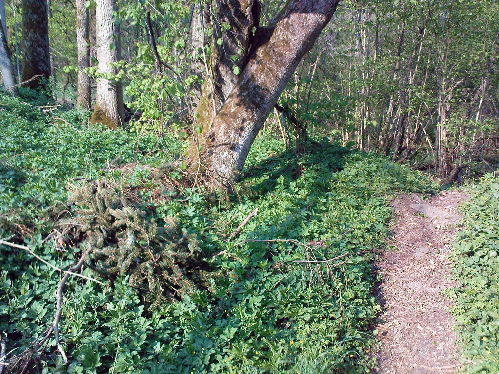 (LSG:BY-LSG-00139.02)_Wässernachtal im Landkreis Haßfurt – Teil II - Wanderweg entlang der Wässernach